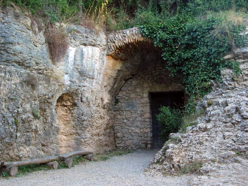 Entrada a la cueva del Toll (cova del Toll). Moià, Barcelona (España).